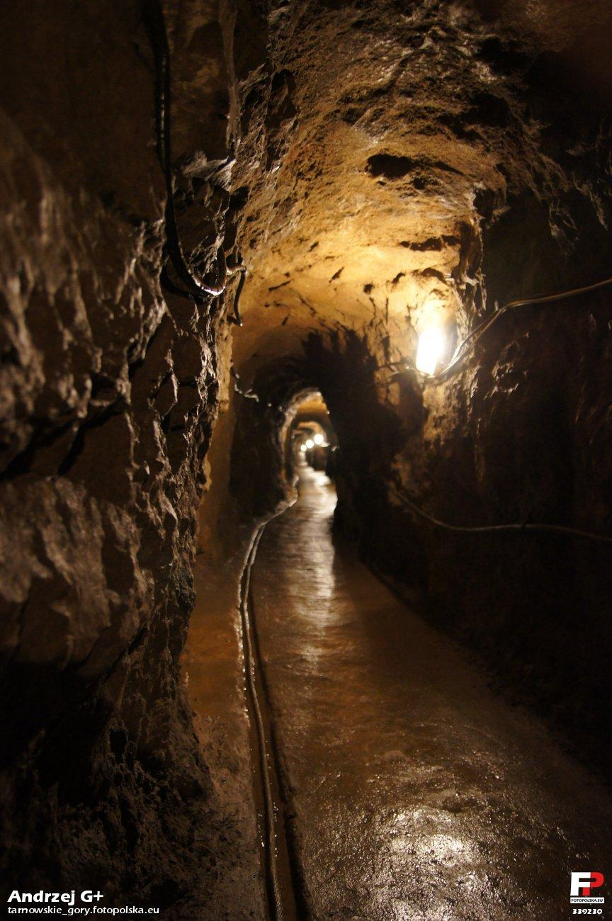 Chodnik we wnętrzu tarnogórskiej kopalni srebra. Widoczna po lewej stronie rynna ciągnąca się wzdłuż chodnika służy do odprowadzenia skraplającej się wody do systemu odwodnienia kopalni.